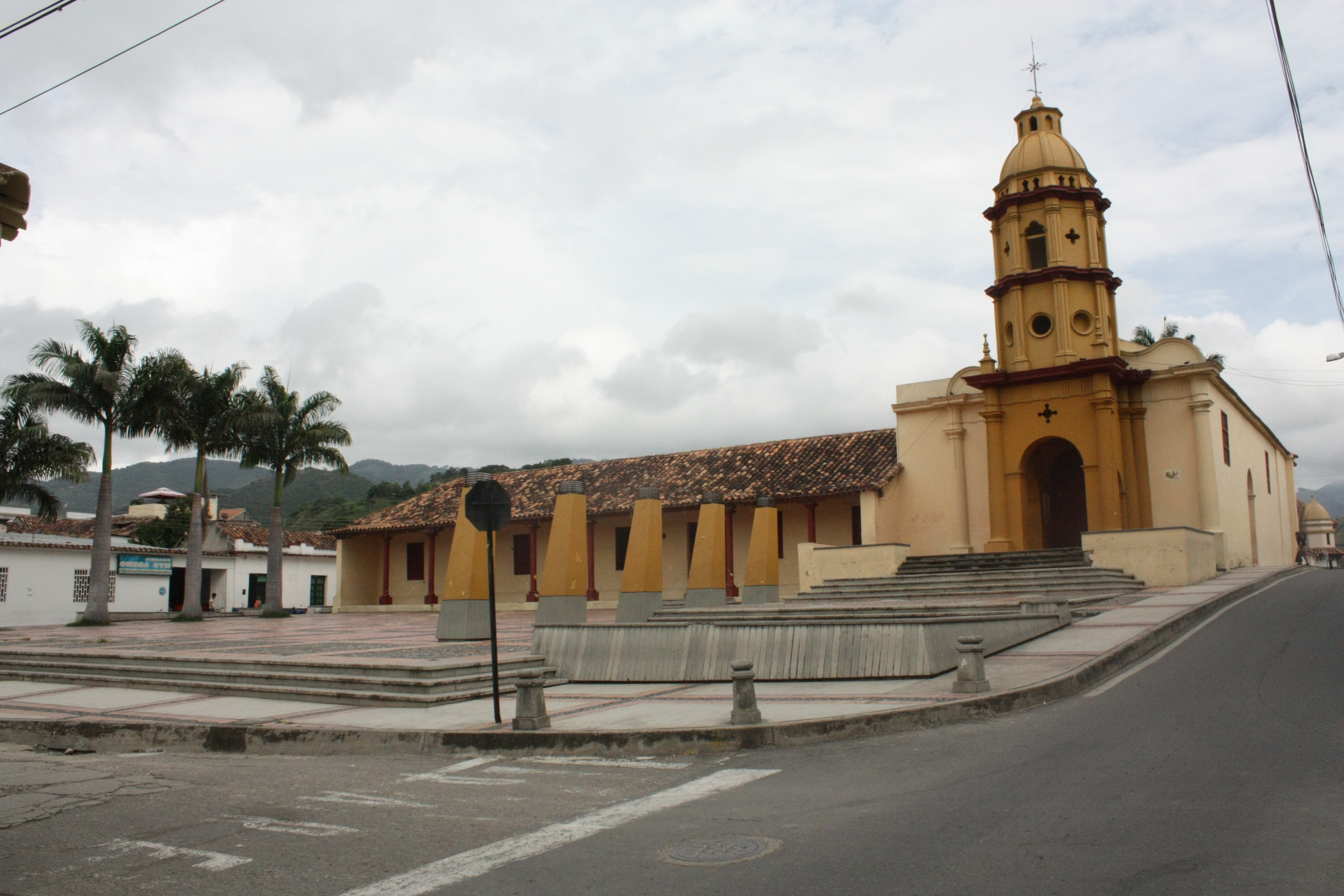 La bipolaridad de la historia con el presente.